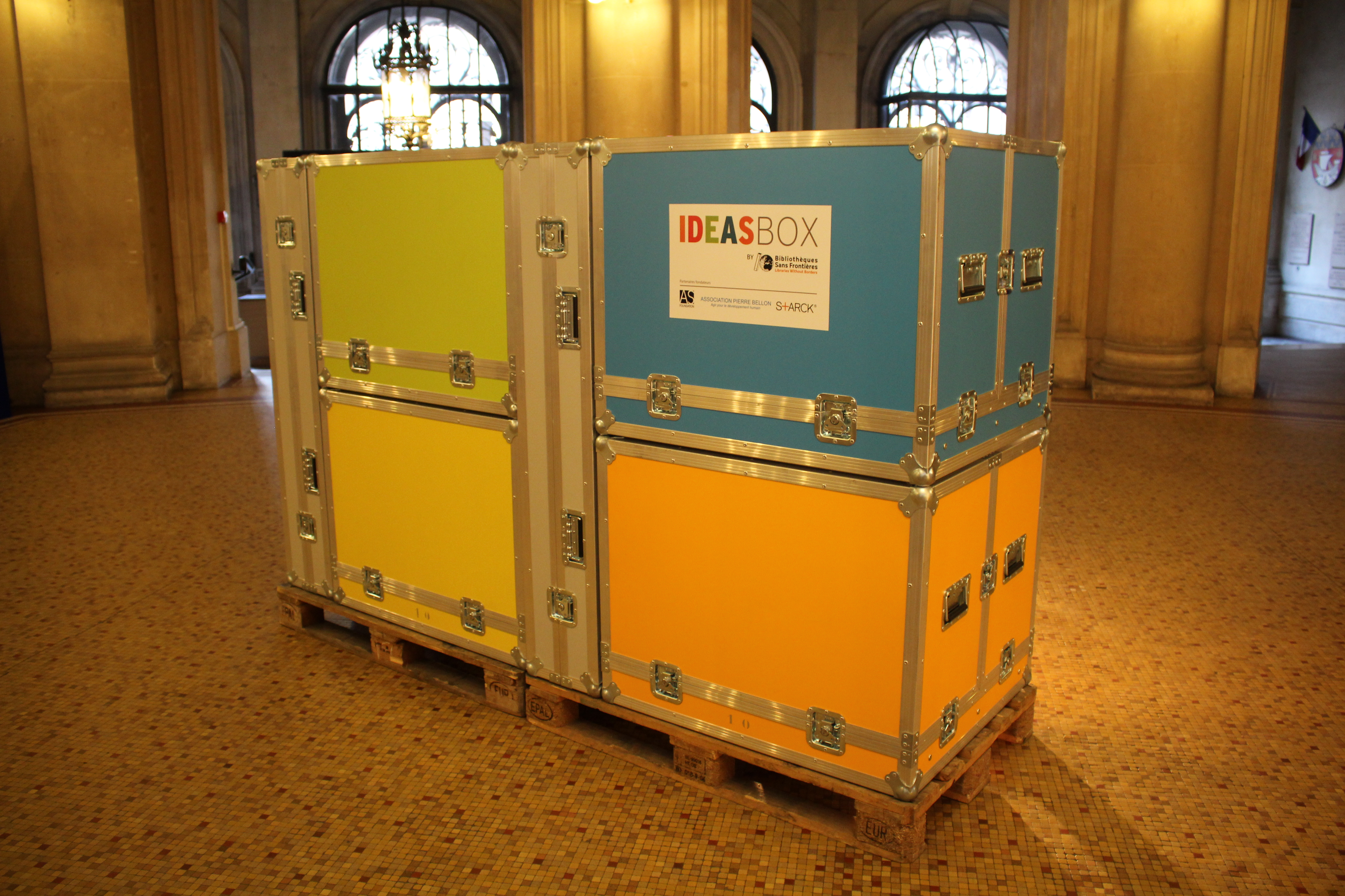 Bibliothèques Sans Frontières - Ideas Box à la Mairie du 10e, Paris.